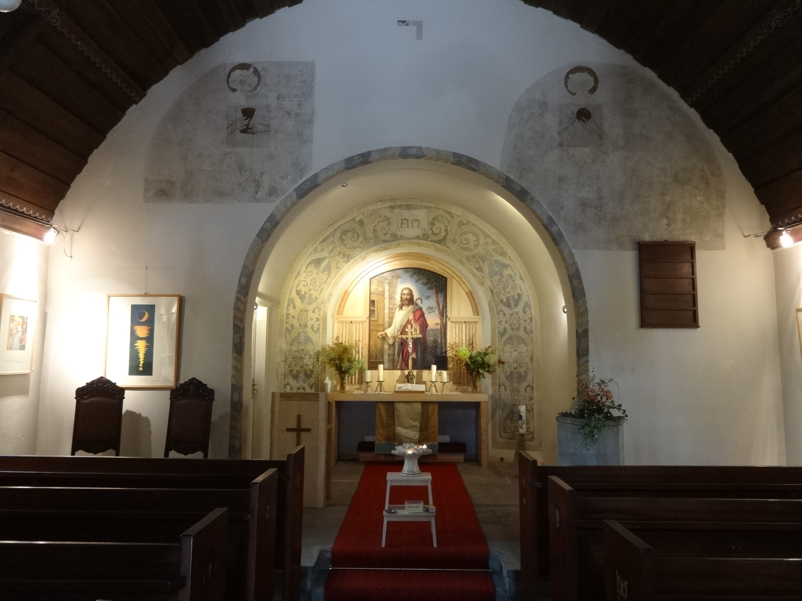 Waldkapelle Zum anklopfenden Christus aus dem Jahr 1922 in Rahnsdorf, ein Ortsteil von Berlin-Treptow-Köpenick.